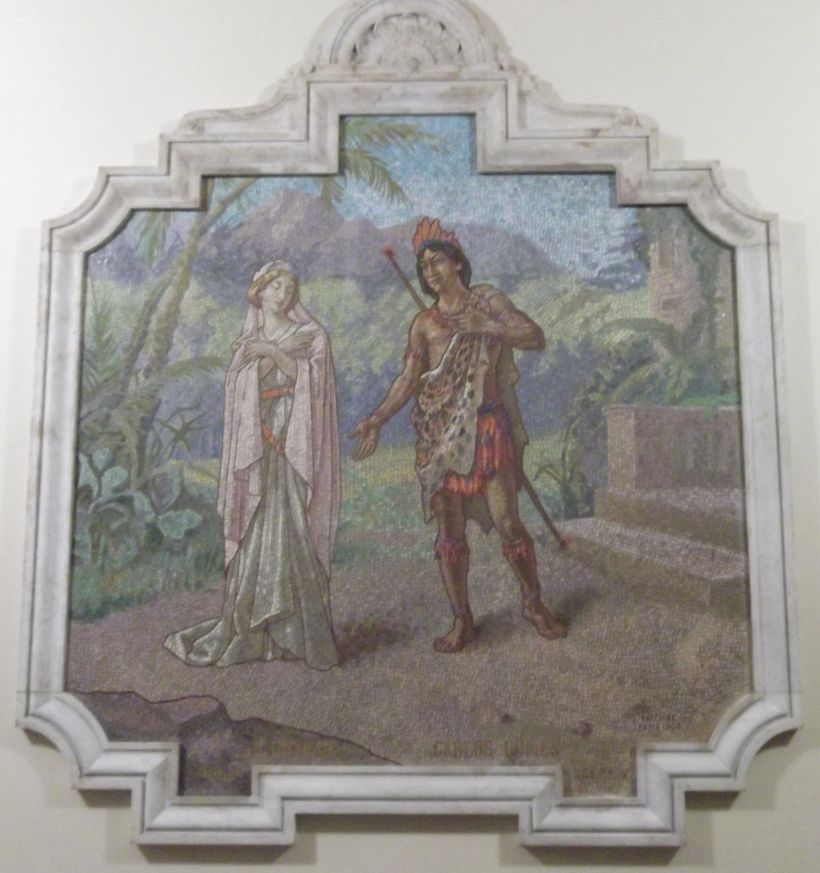 Teatro Municipal do Rio de Janeiro : Mosaico : Il Guarani